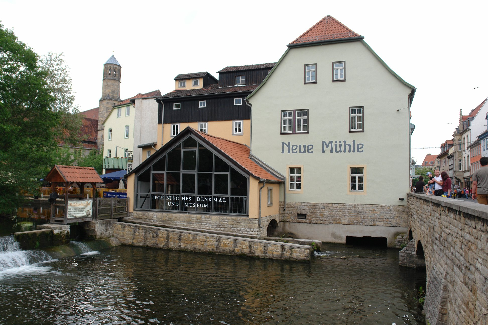 Neue Mühle (Erfurt) (erste Erwähnung im 13. Jahrhundert als Hirschmühle, Martinsmühle), in der Schlösserstraße in Erfurt